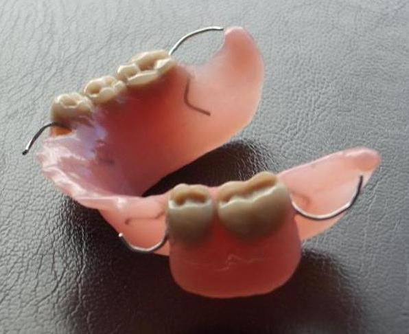 Parcial de resina. Nivel aprendiz. 2004.